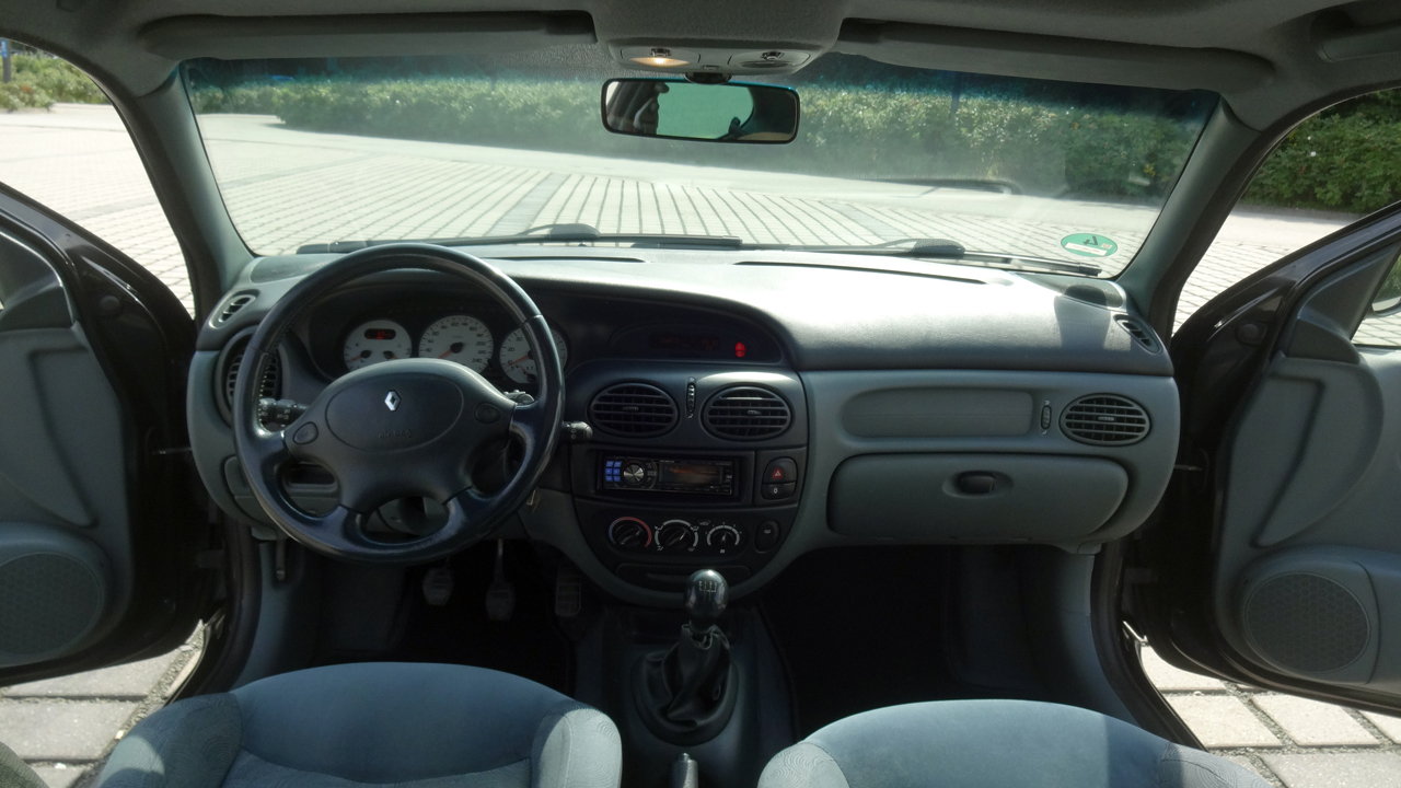 Megane Coach 1.6e - Innenraum Vorne